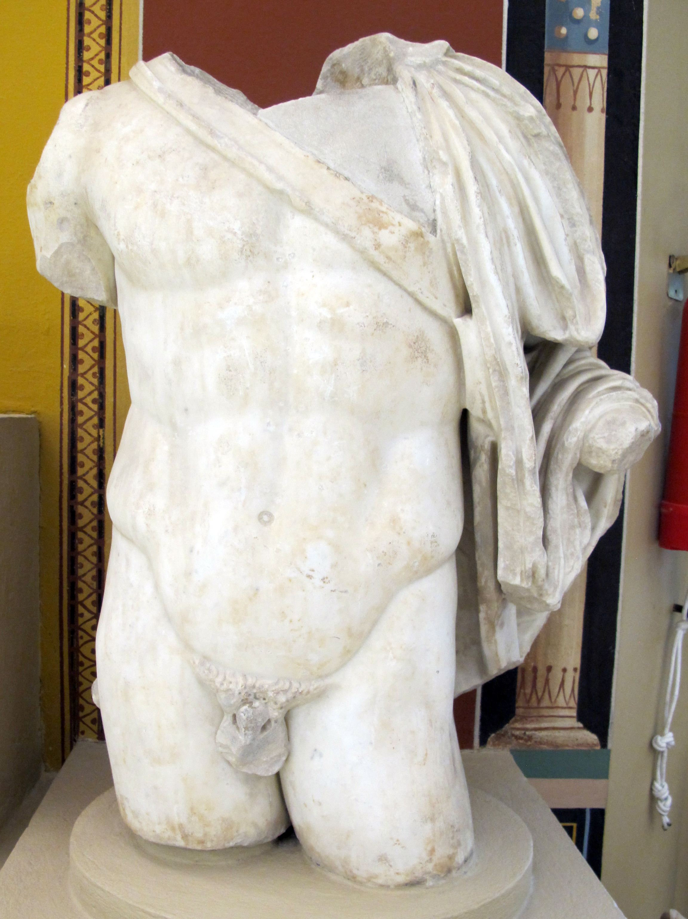 Museo civico archeologico (Bologna)